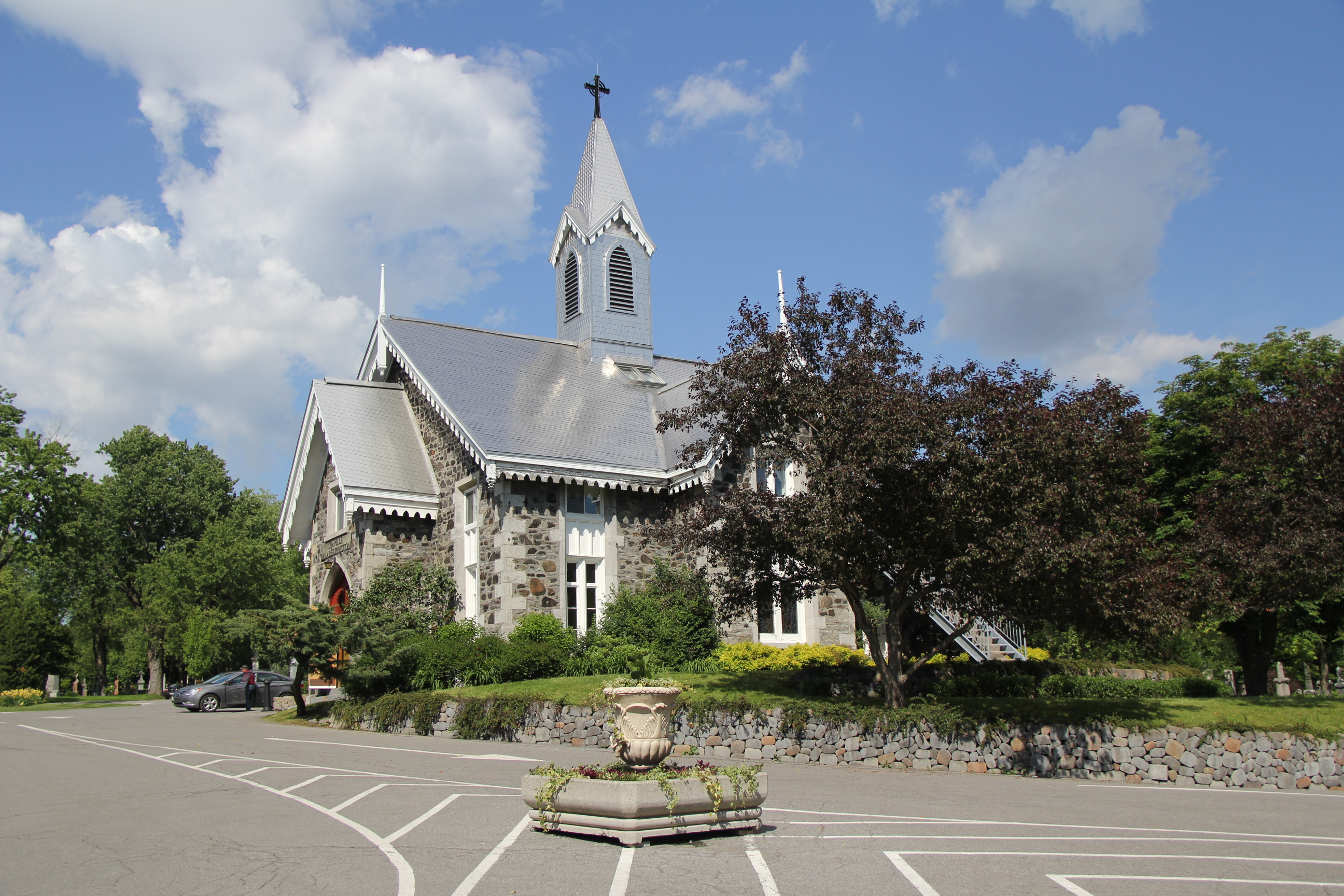 Notre-Dame-de-la-Résurrection Chapel.